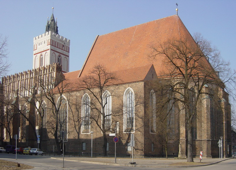 Marienkirche Frankfurt (Oder) Autor: Oge68